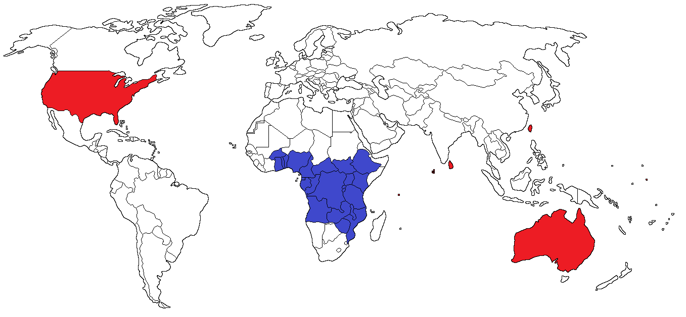 Distribucion de Laevicaulis Alte